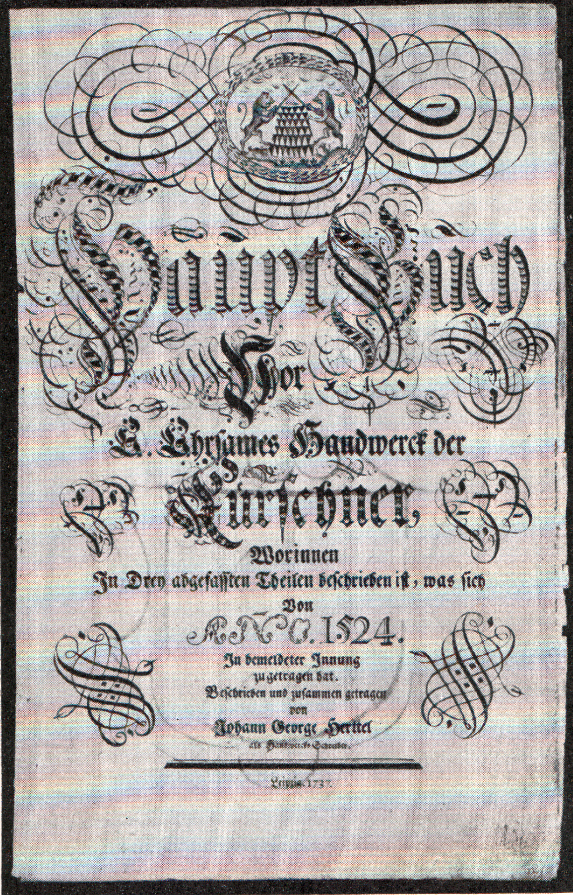 Hauptbuch Vor E. Ehrsames Handwerck der Kürschner worinnen In Drey abgefassten Theilen beschrieben ist, was sich anno 1524 In bemeldeter Innung zugetragen hat. Beschrieben und Zusammen getragen von Johann George Herttel als Handwercks-Schreiber. Leipzig 1737.